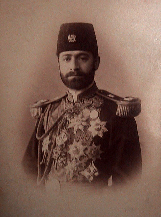 Ismail Mumtaz